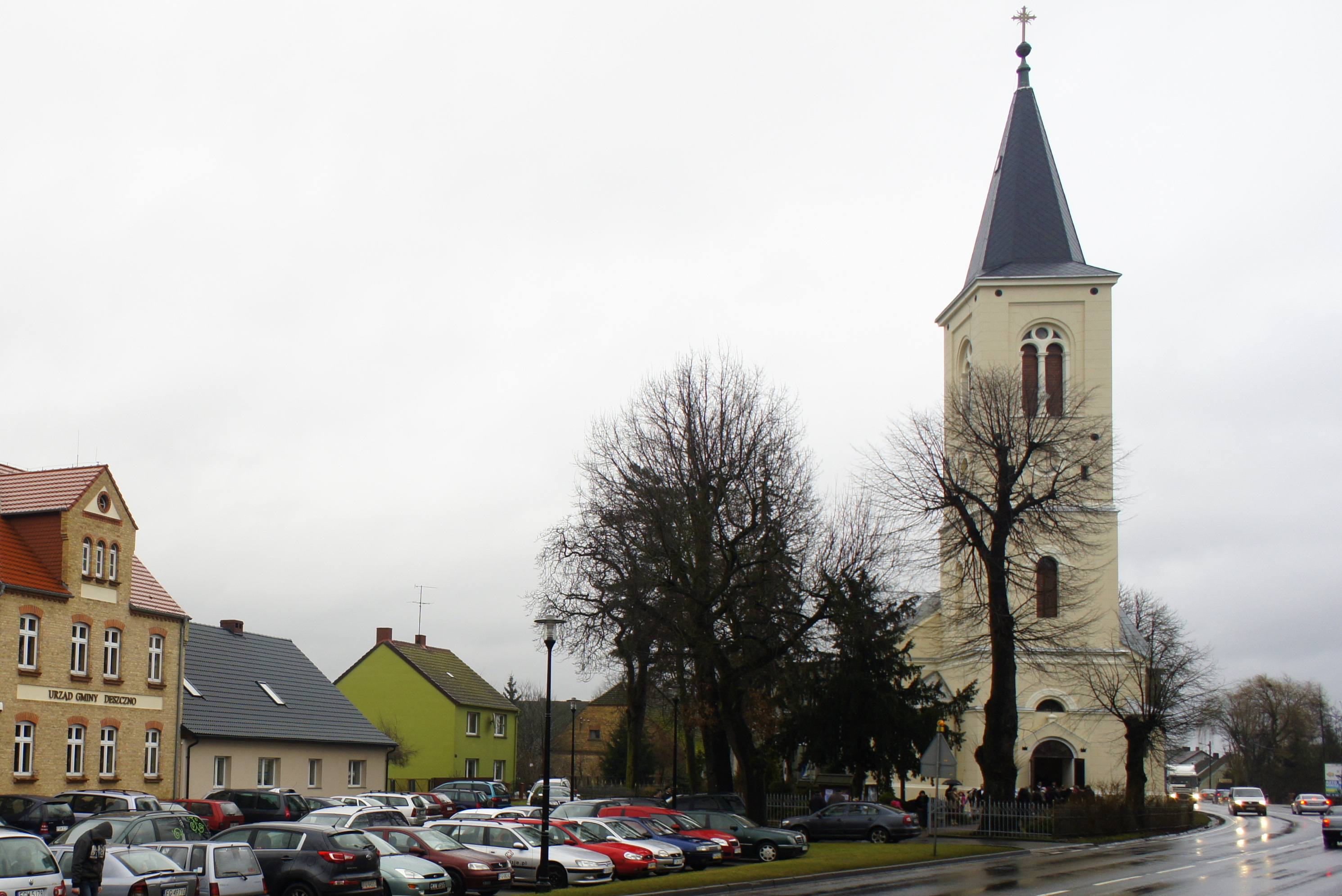 Deszczno, dawny kościół ewangelicki, ob. rzym.-kat. p.w. Podwyższenia Krzyża Św., 1892